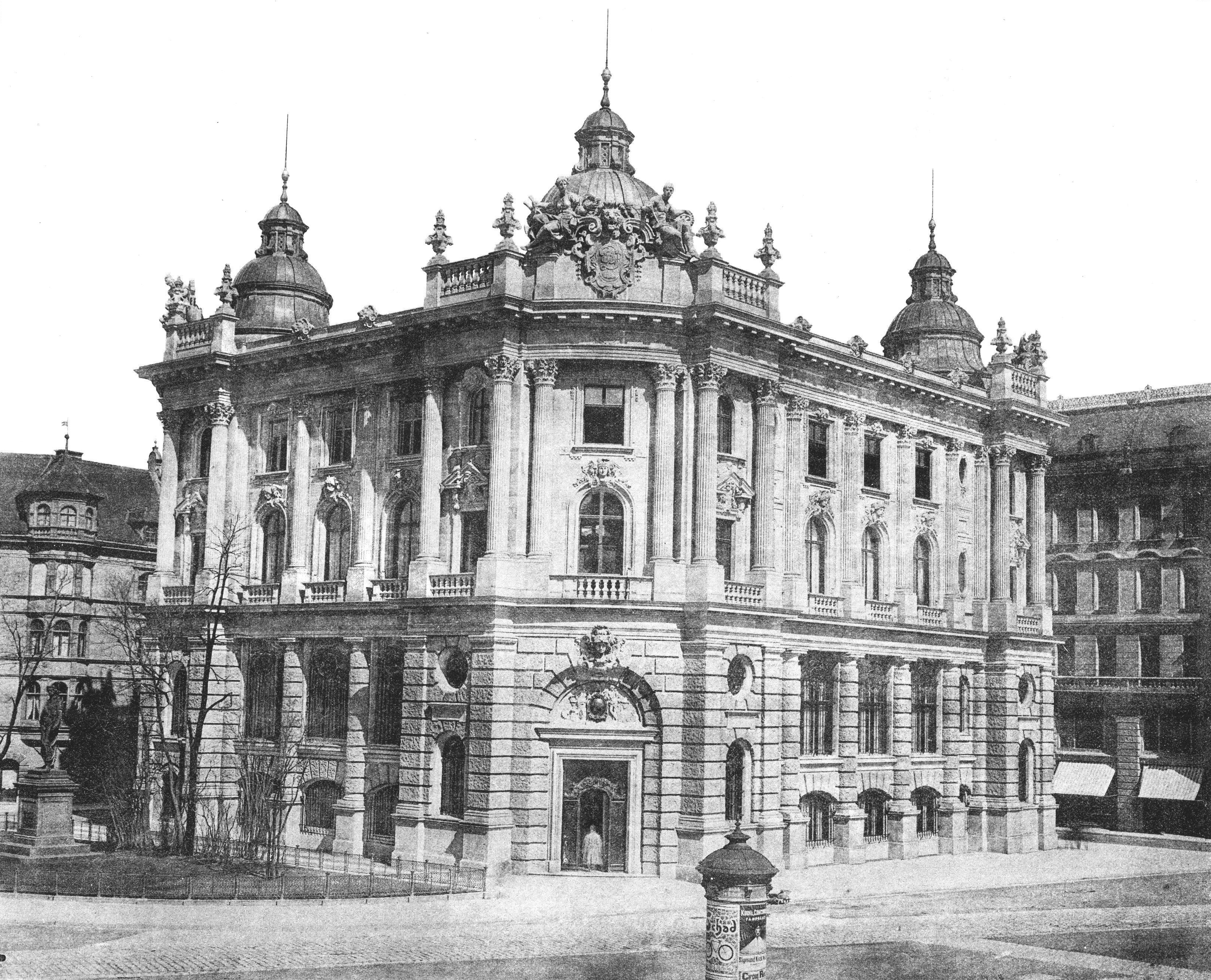 Der Neubau der Deutschen Bank in München